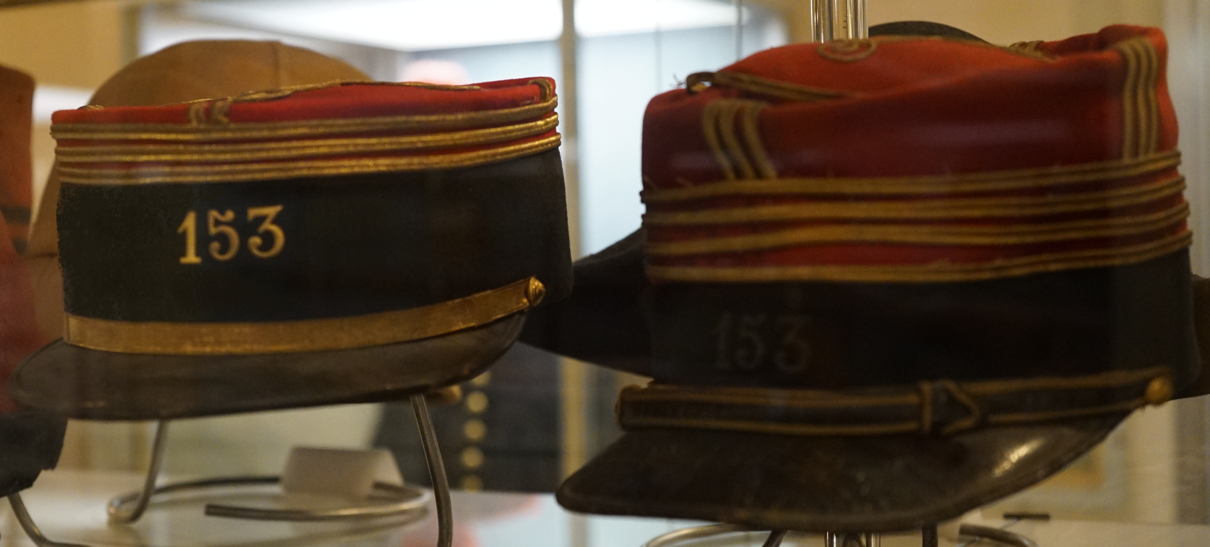 présenté au musée de TOul.